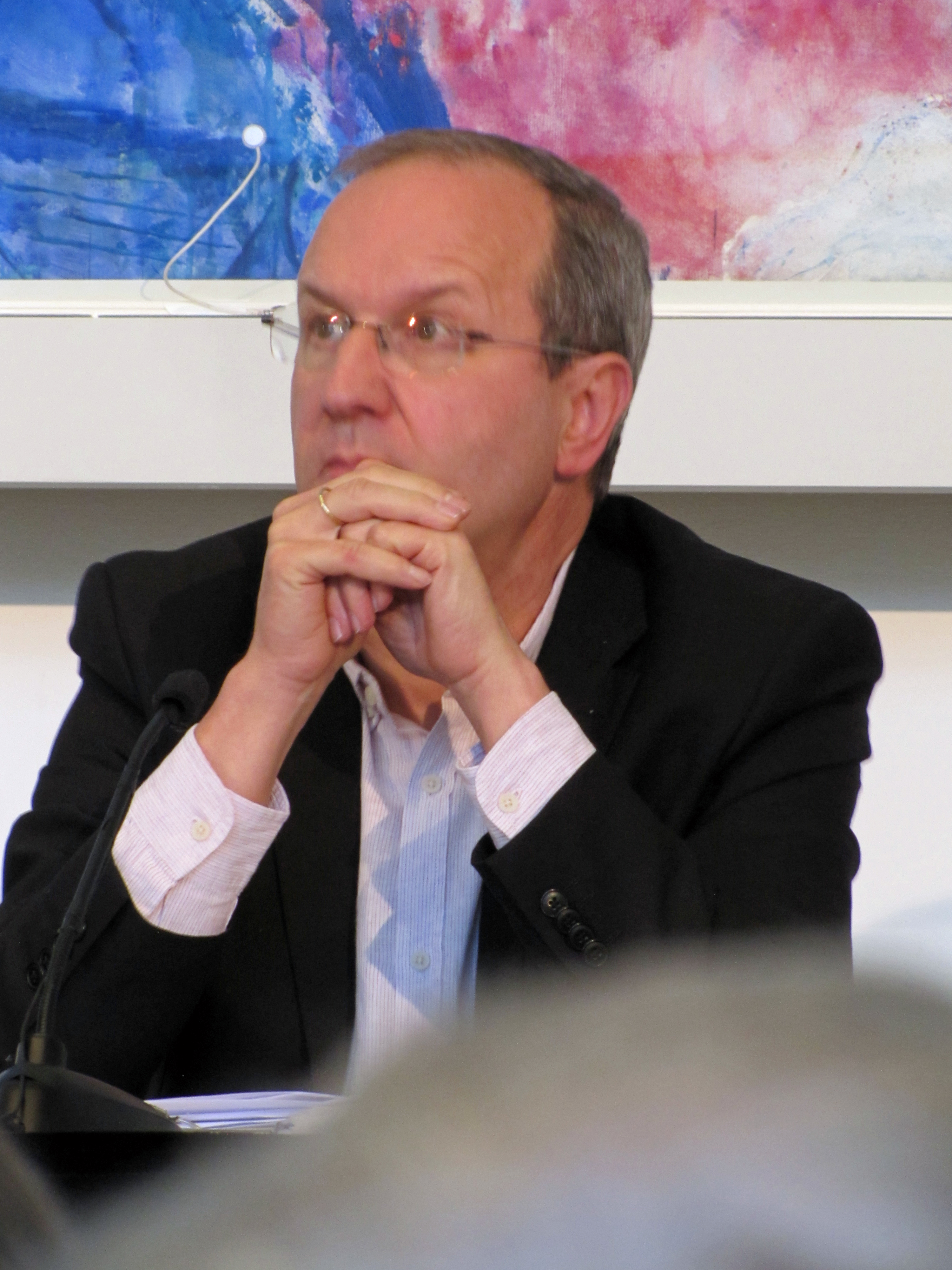 Gunther Hellmann, bei den 47. Römerberggesprächen, Thema:„30 Jahre nach dem Mauerfall – mehr Aufbruch wagen“, im November 2019 im Chagall-Saal der Städtischen Bühnen in Frankfurt am Main.